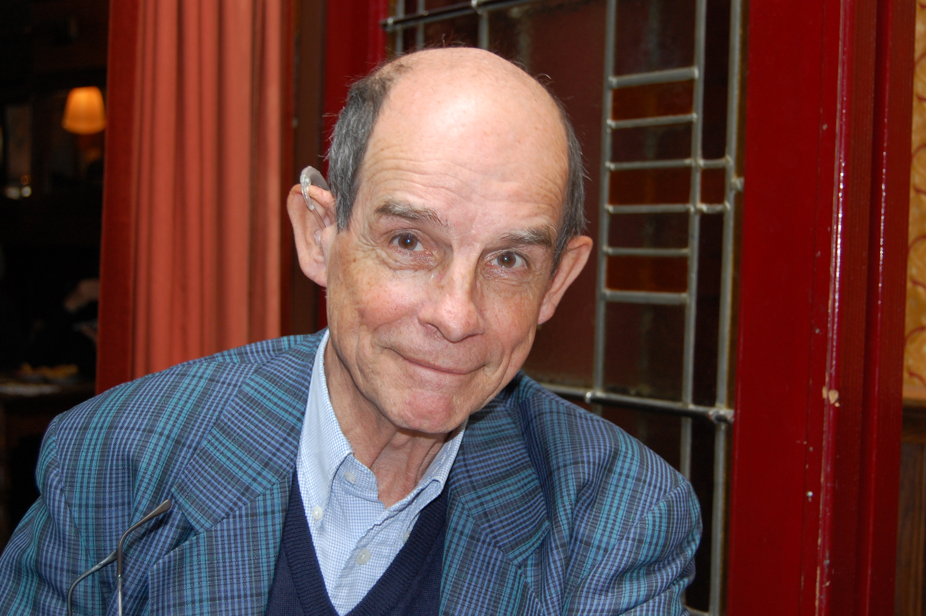 Joop Visser voorheen bekend als Jaap Fischer.